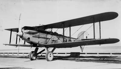 Eine argentinische Fairey IIIF Corsair 1930